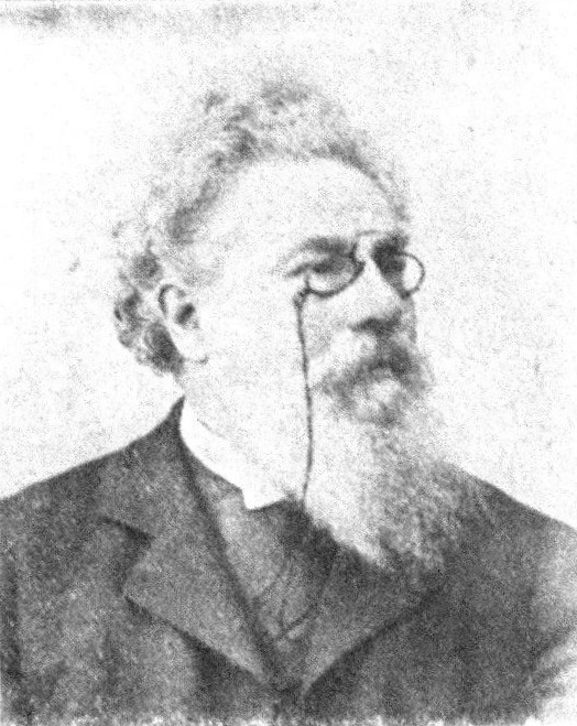 Österreichischer Politiker, Reichsratswahl 1907, Name siehe Dateiname